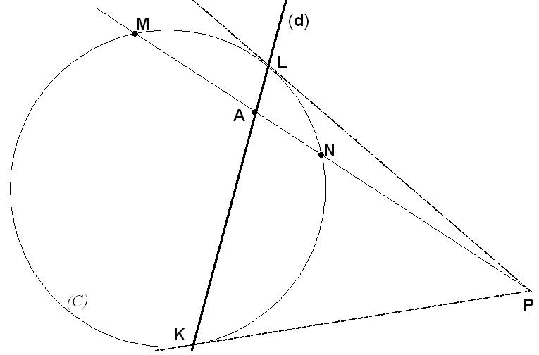 construction de la polaire d'un point par rapport à un cercle